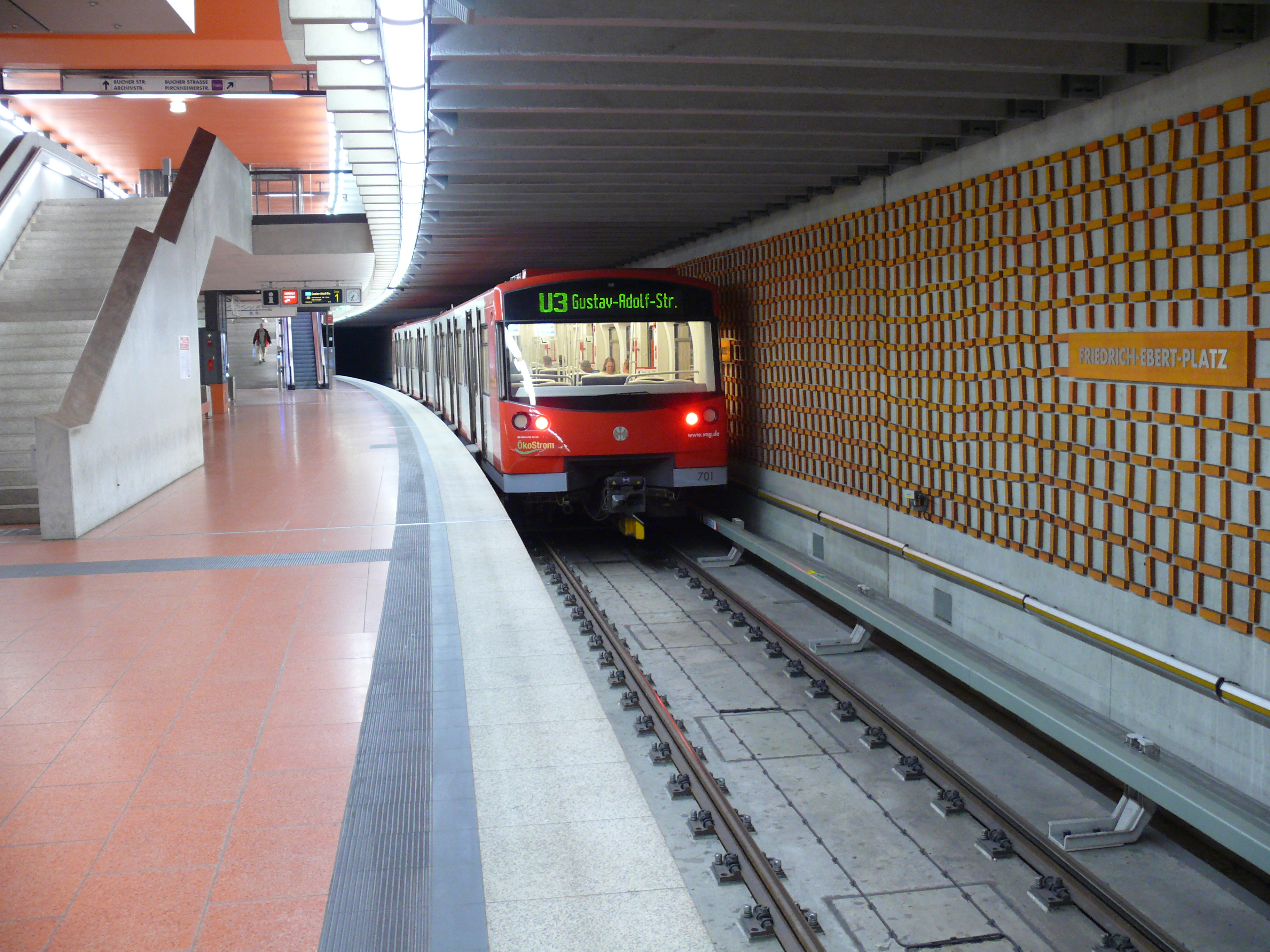 Abfahrbereiter U-Bahnzug vom Typ DT3 der Linie U3 am U-Bahnhof Friedrich-Ebert-Platz in Nürnberg.